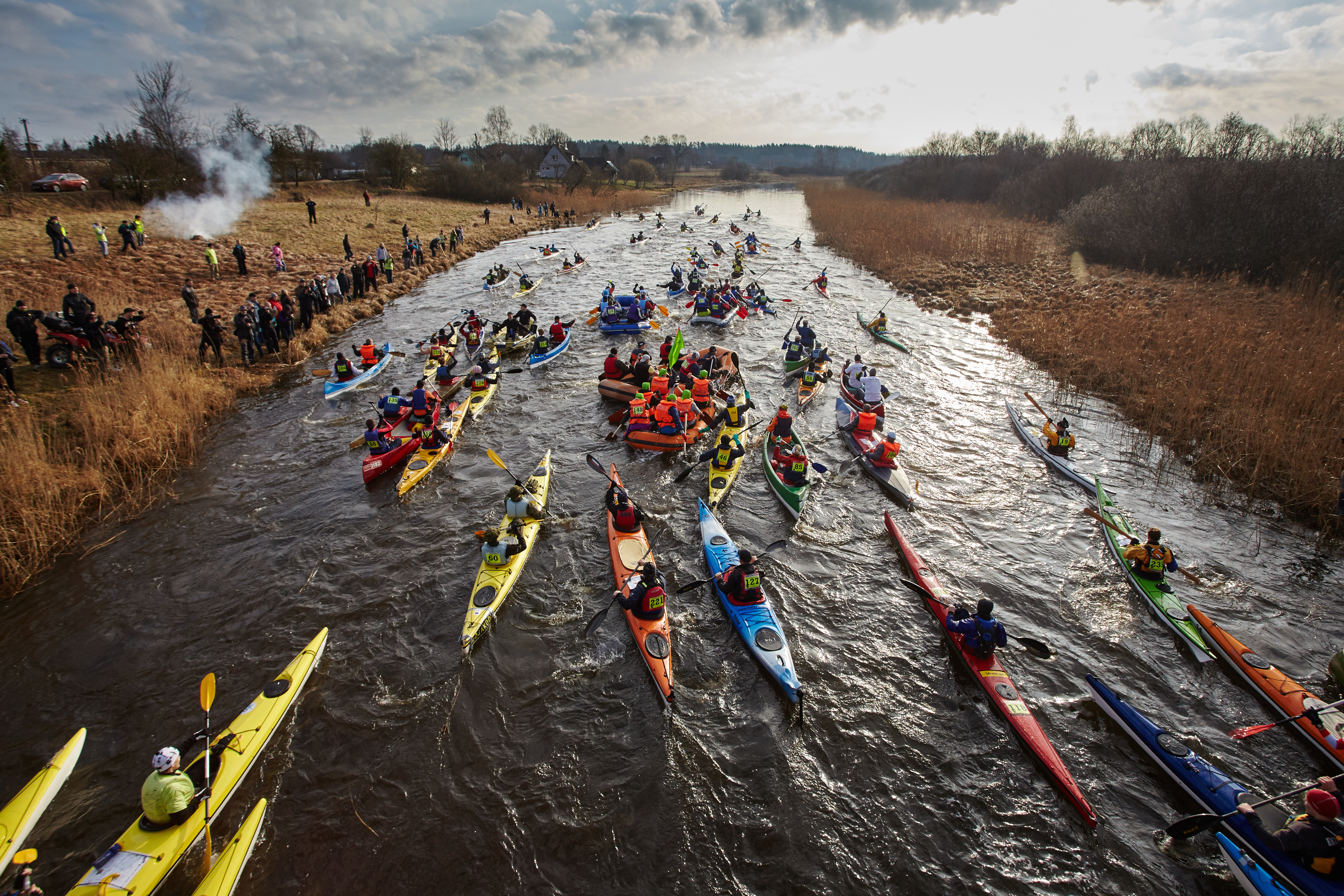 Võhandu maraton pärast starti, Kirumpää sild